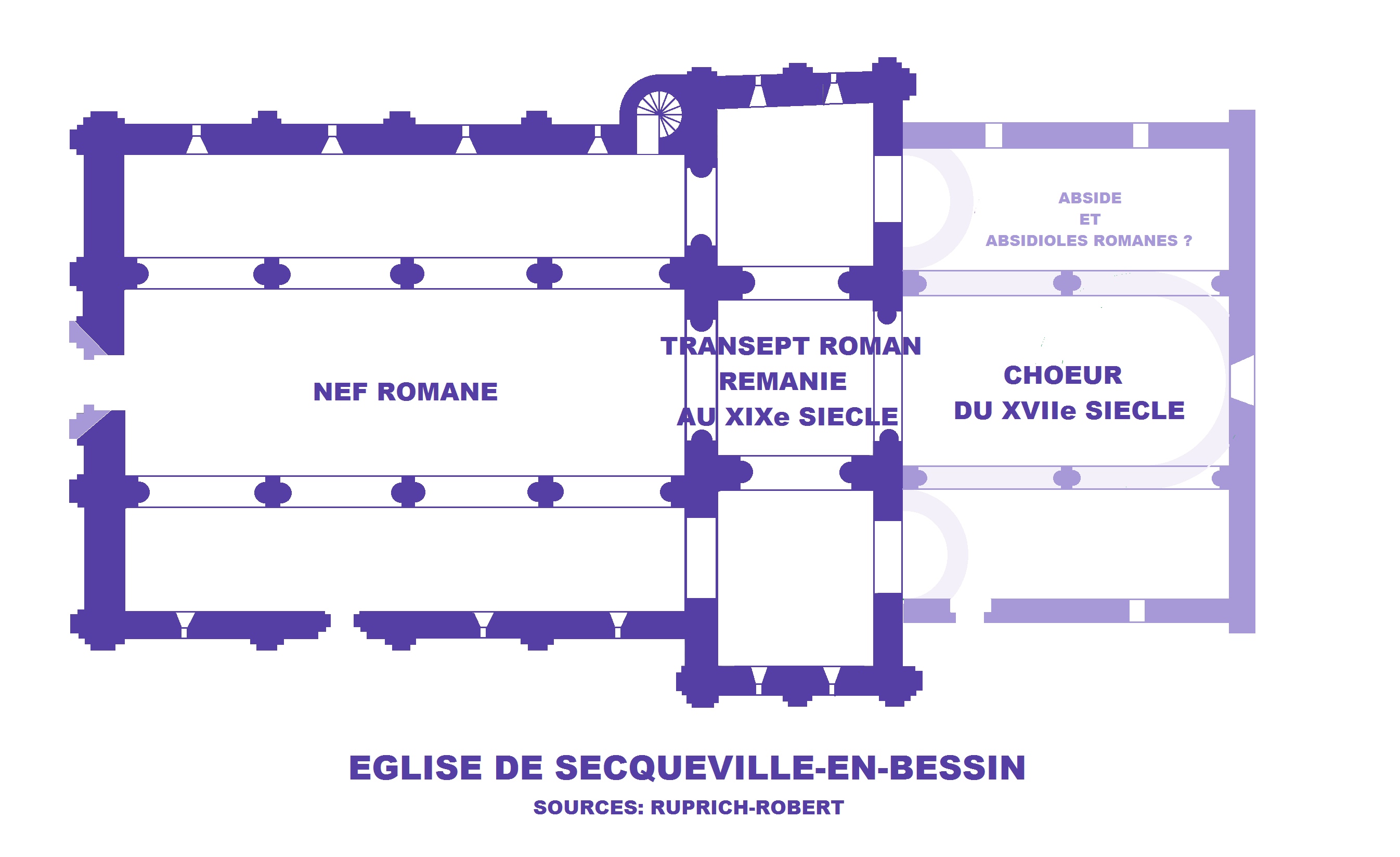 Secqueville-en-Bessin, 14, Plan de l'églse